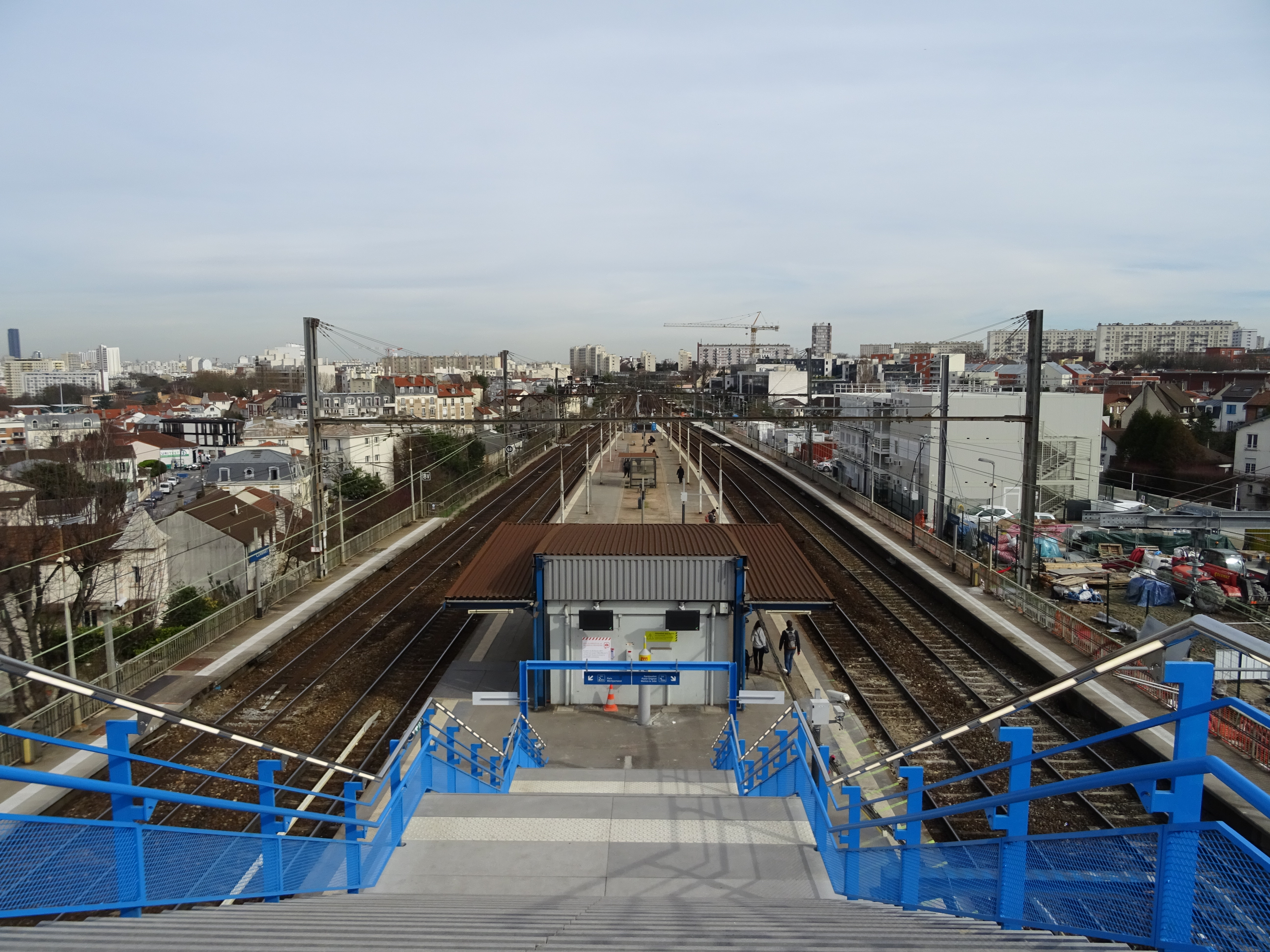 Vue d'ensemble du quai central de la gare de Clamart depuis la passerelle d'accès. La vue est prise face à Paris.